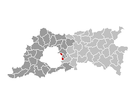 Map locating Kraainem